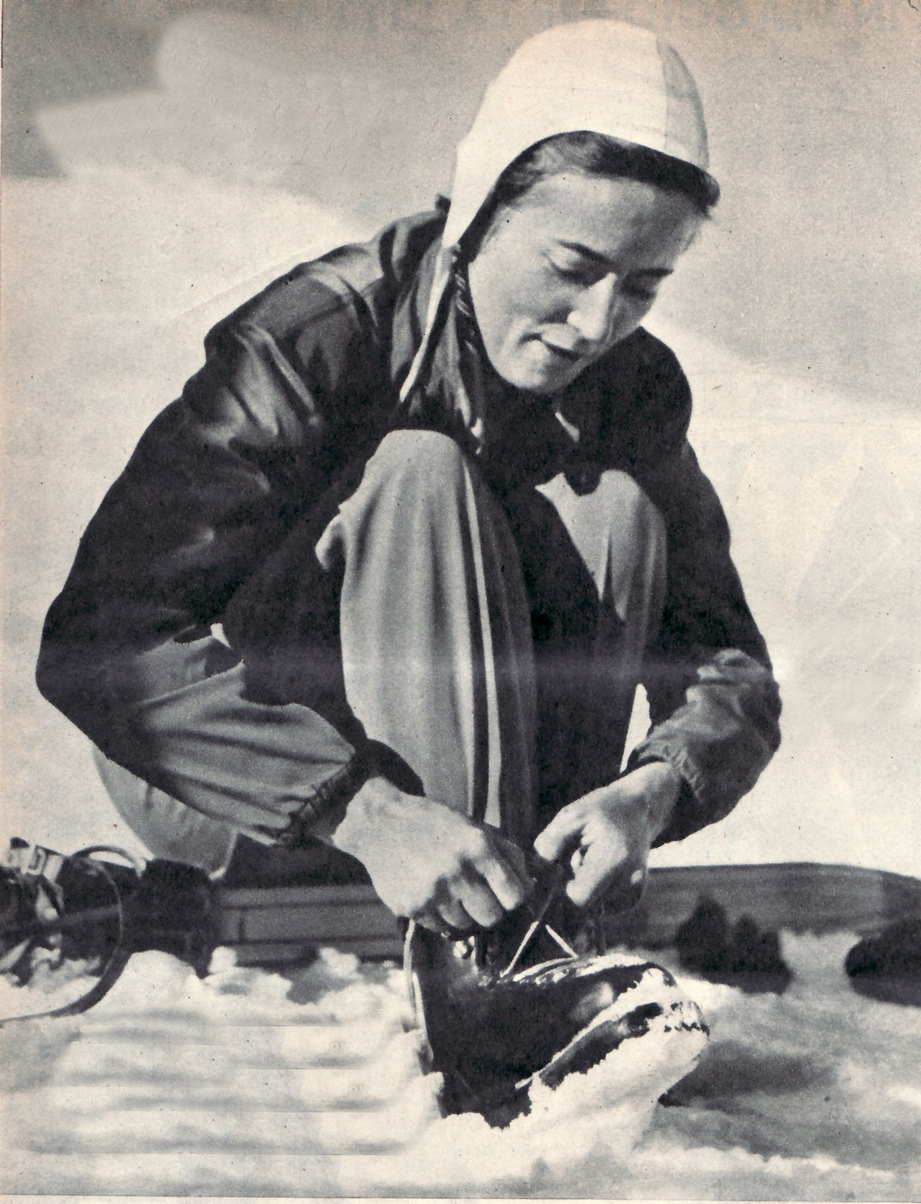 photo from Italian magazine Avanguardia, 1956.